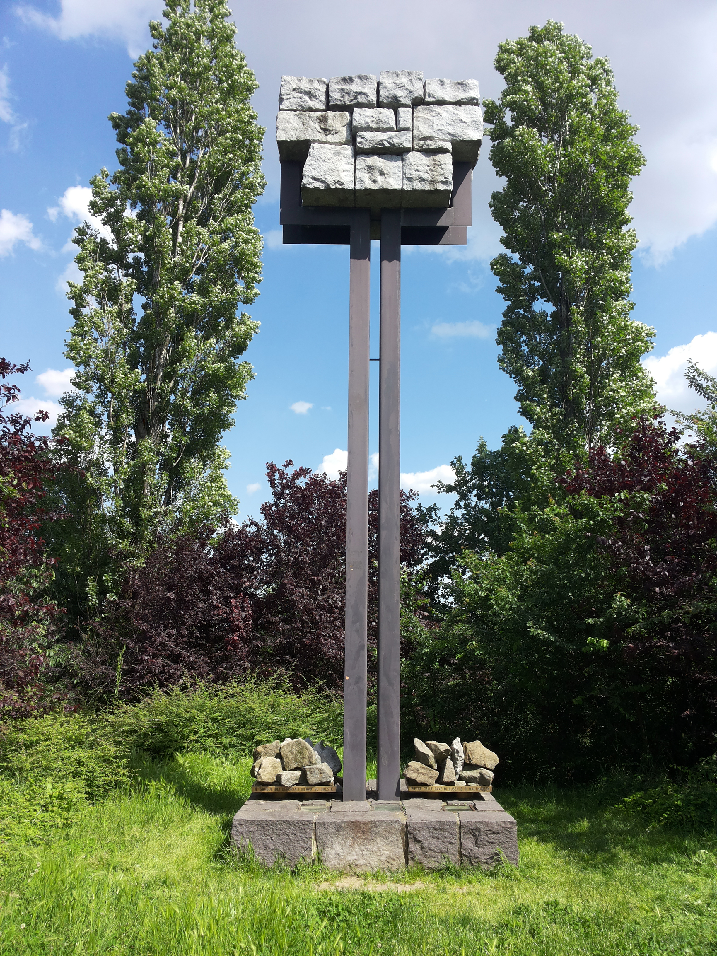 Monumento al Deportato - Stele